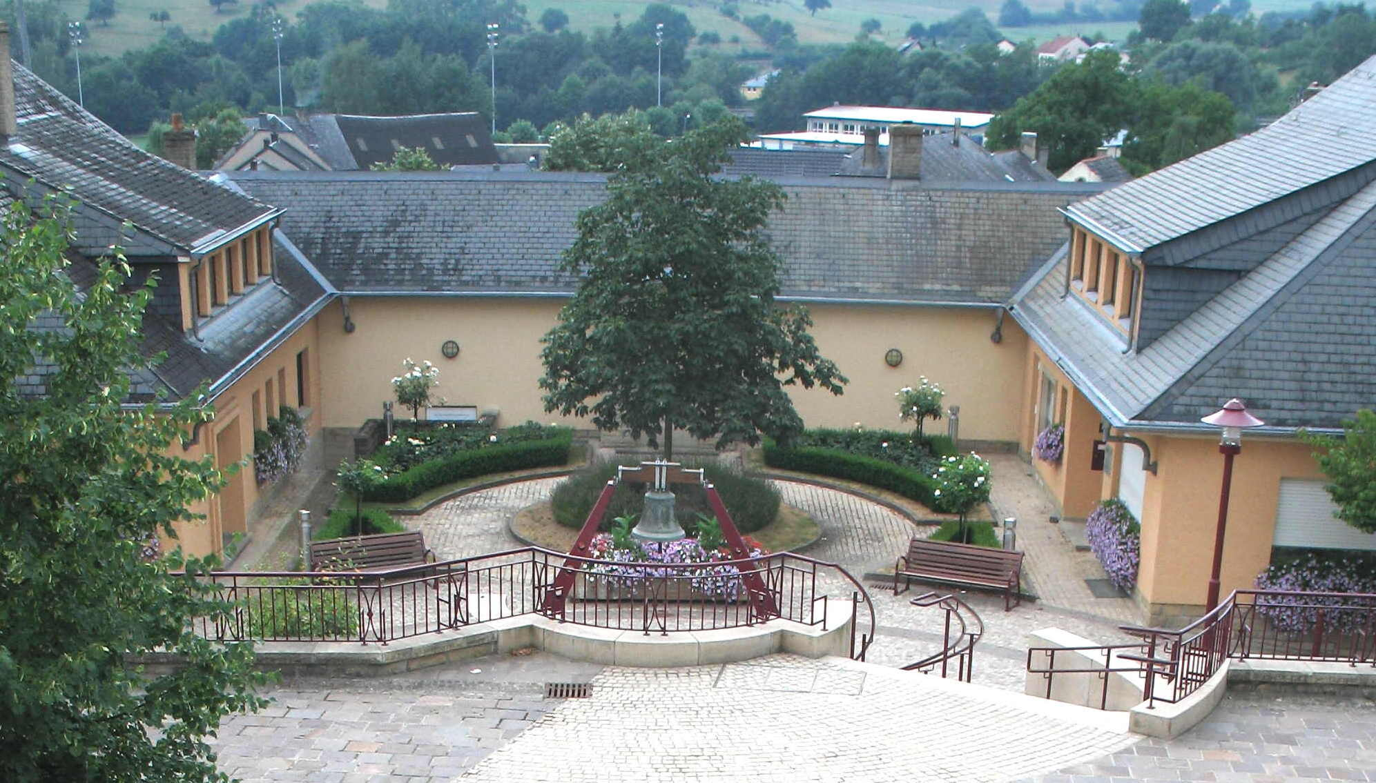 Gemeng vu Miedernach